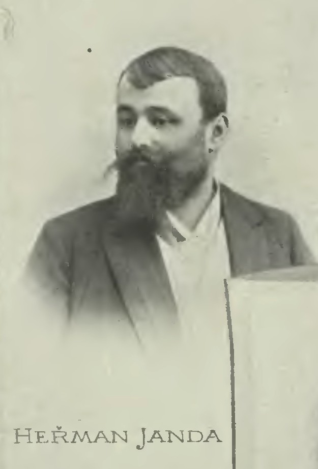 Portrét – Heřman Janda (1860-1904), Český politik.